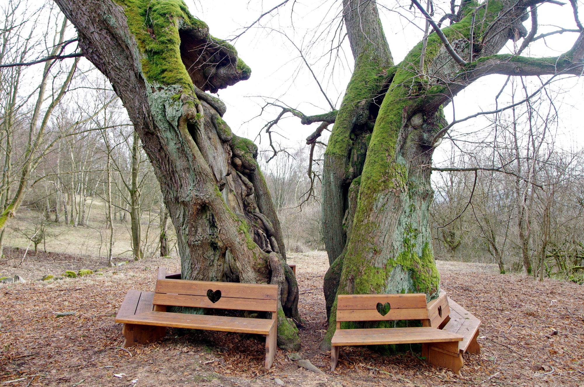 Památný strom Dolní Popovská lípa, okres Karlovy Vary